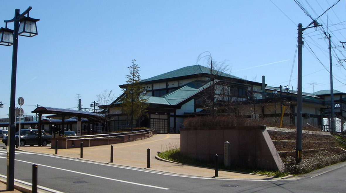 垂井駅(JR東海・東海道線、岐阜県垂井町)北側 撮影：投稿者(Monami、撮影日：2005年6月